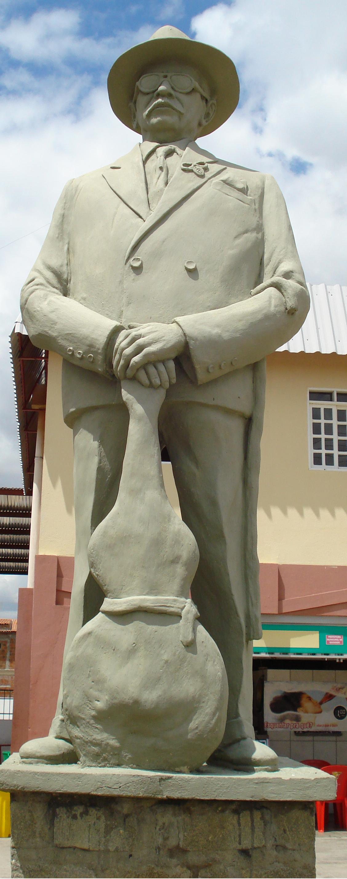 estátua do "Cego Aderaldo" (Aderaldo Ferreira de Araújo ) Localizada em frente à rodoviária de Quixadá, Ceará, Brasil.